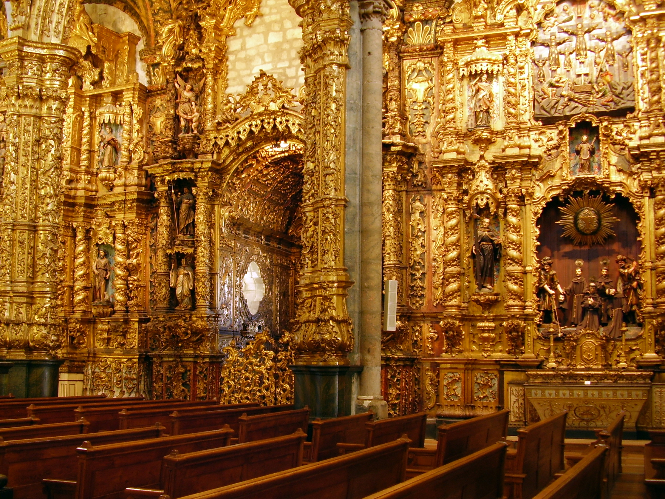 Igreja de São Francisco (Porto) This file was uploaded for Wiki Loves Monuments in Portugal with the unique identifier 70199.